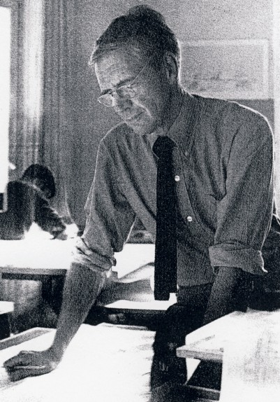 Arkitekt Anders Tengbom på sitt kontor på 1960-talet.